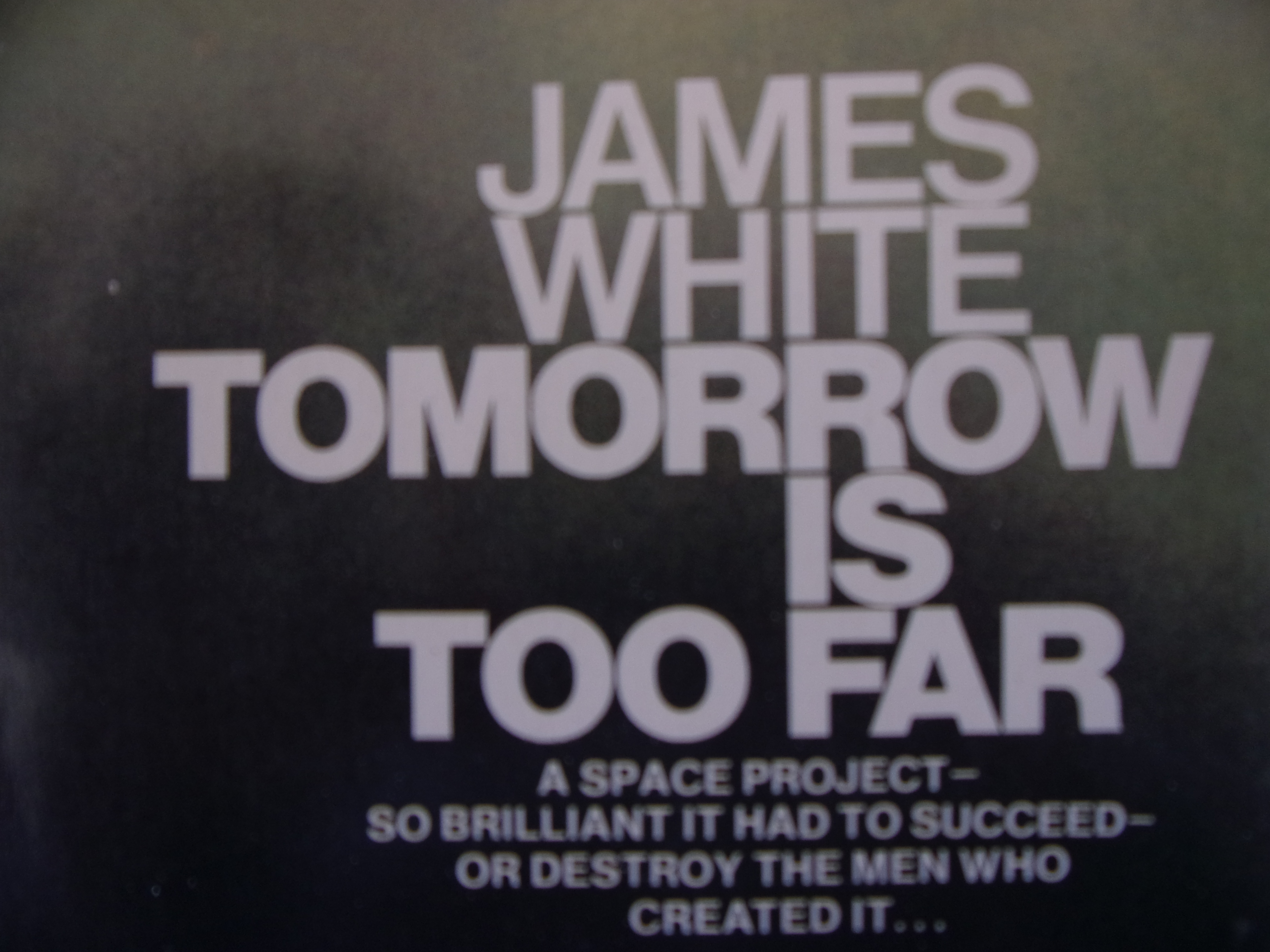 Page de garde de Tomorrow is too far (titre de l'édition de poche aux USA). J'ai pris garde à ne pas inclure dans la photo de logos, pictogrammes ou autres qui seraient protégés par le droit d'auteur.